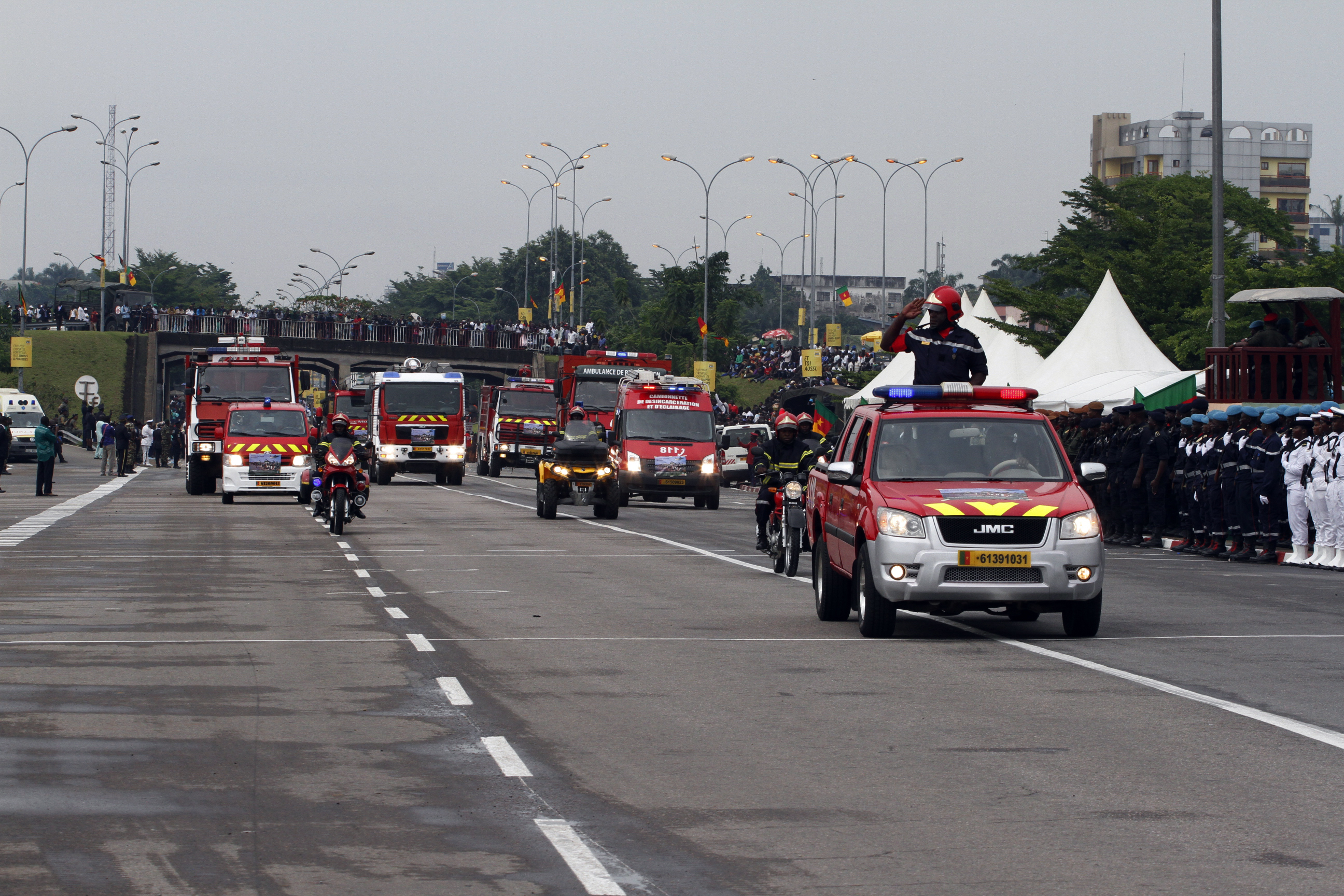 Matériel roulant des sapeurs pompier lors du défilé de la fête nationale du Cameroun le 20 mai 2016 à Douala. This is an image with the theme "Africa on the Move or Transport" from: Cameroon